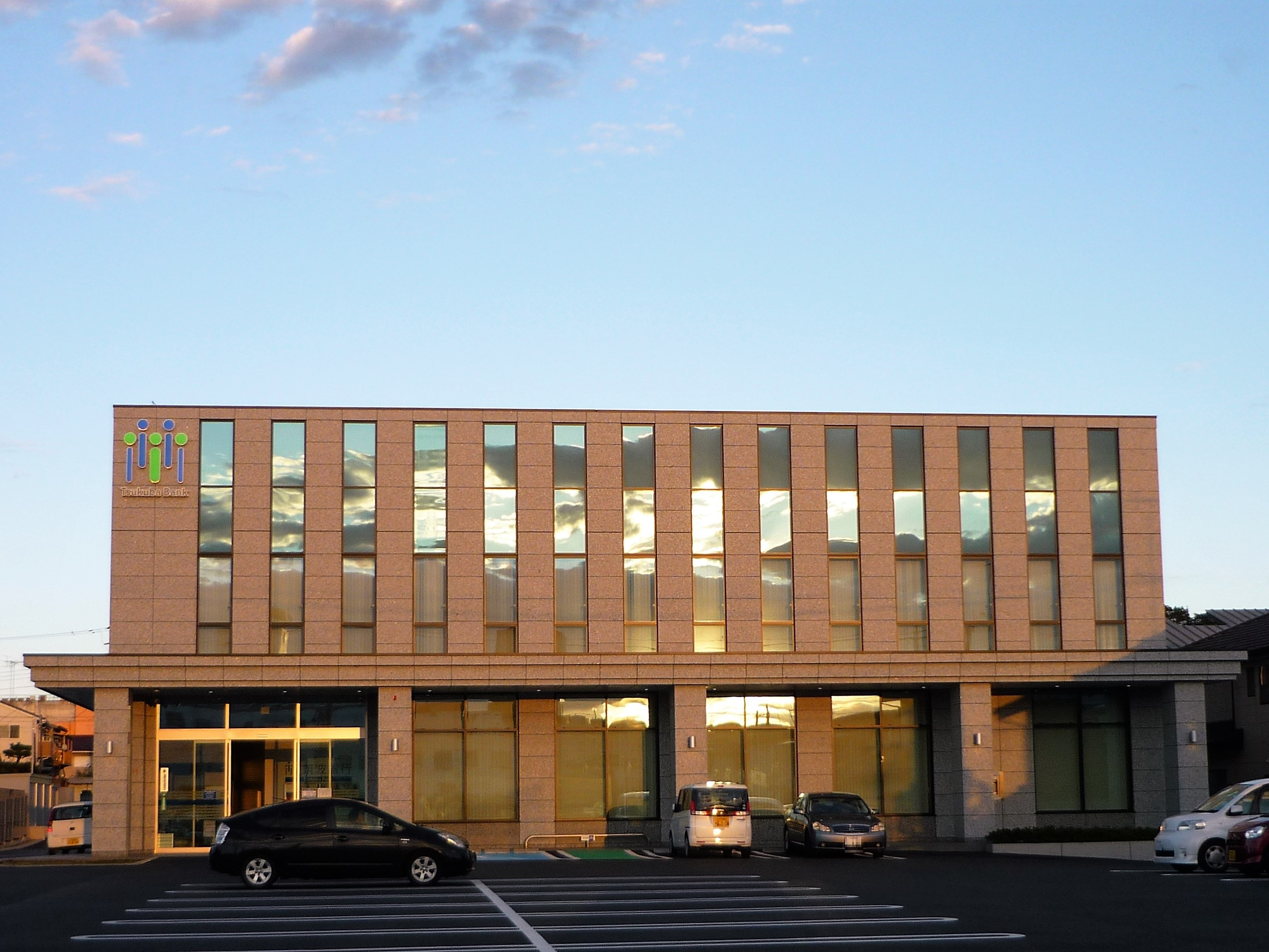 筑波銀行 下妻営業部（下妻市砂沼新田、移転後）